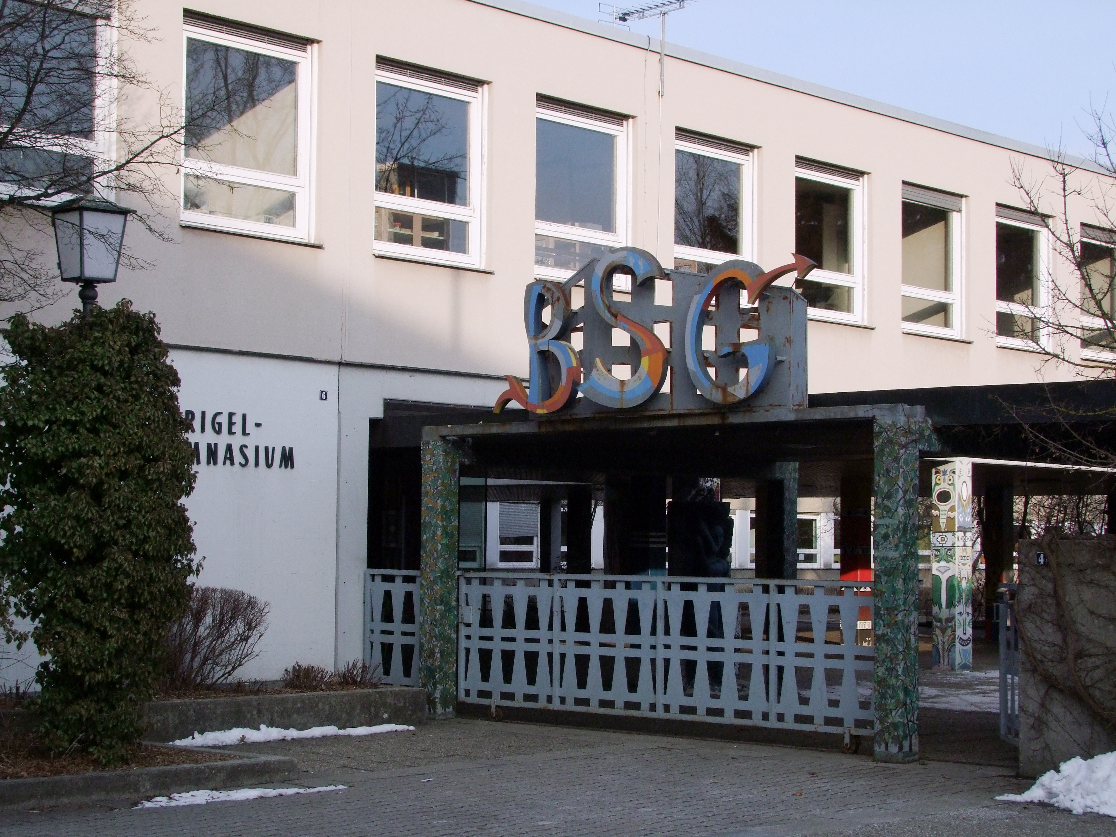 Der Haupteingang des Bernhard-Strigel-Gymnasiums Memmingen.